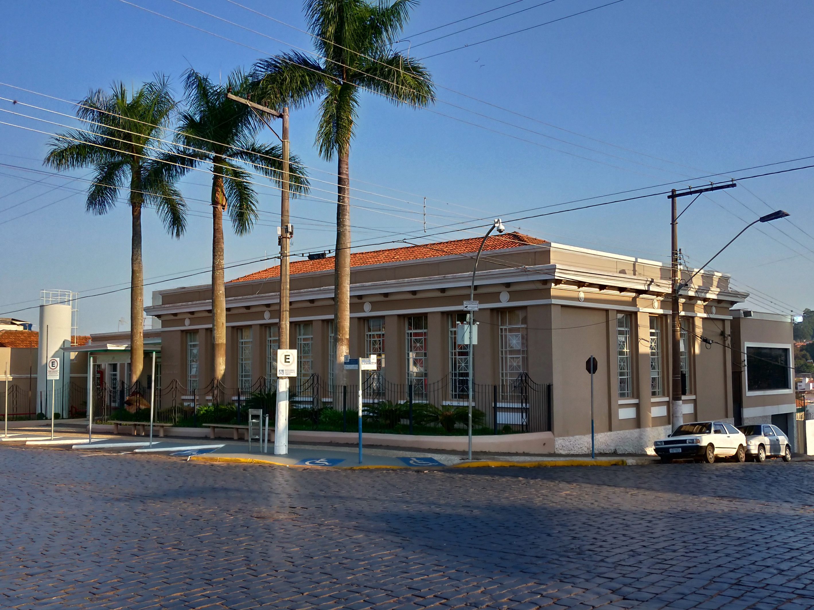 Câmara Municipal de Itararé - SP